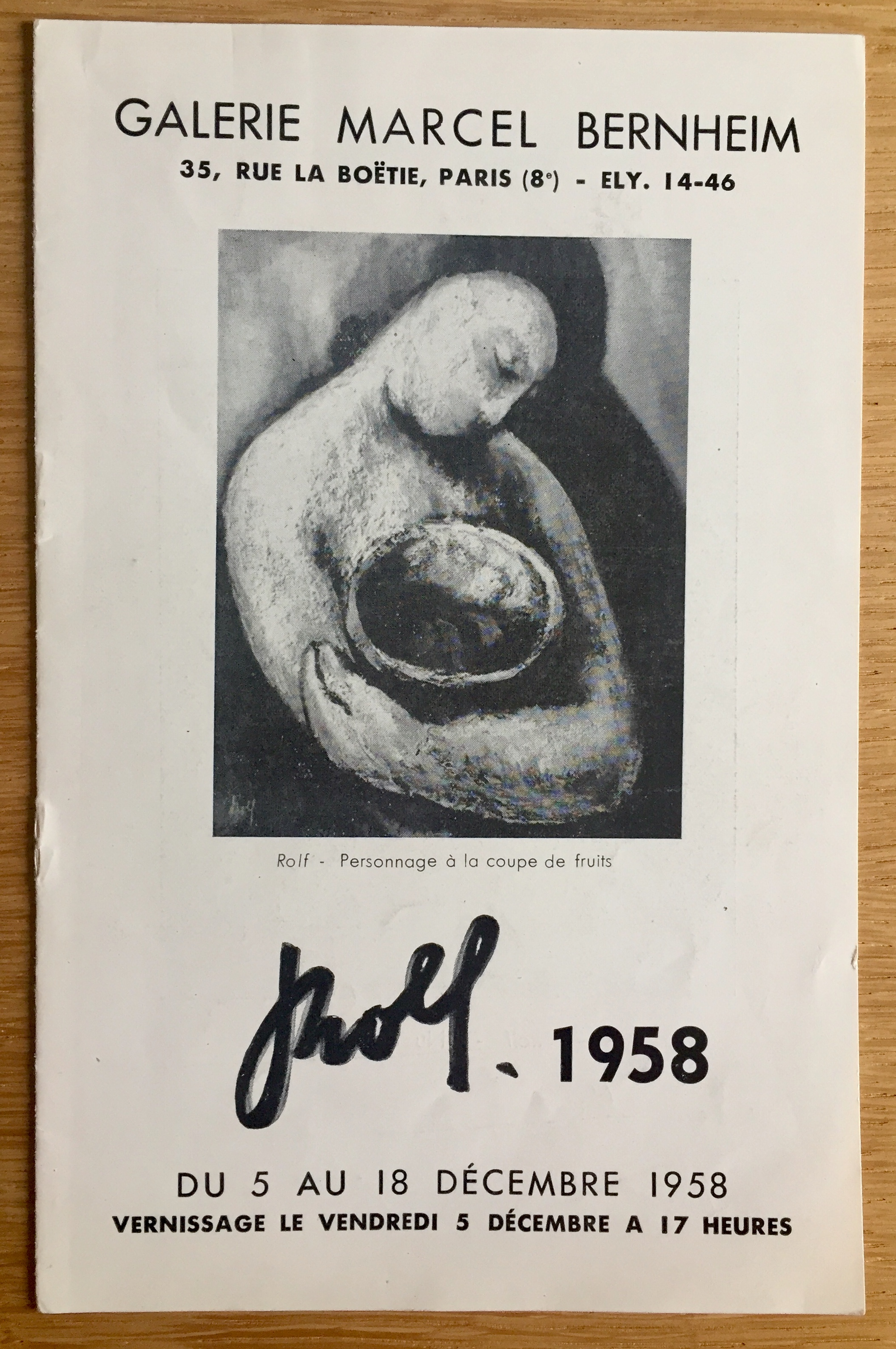 Couverture du catalogue de l'exposition Rolf Hirschland à la Galerie Marcel Bernheim du 5 au 15 décembre 1958